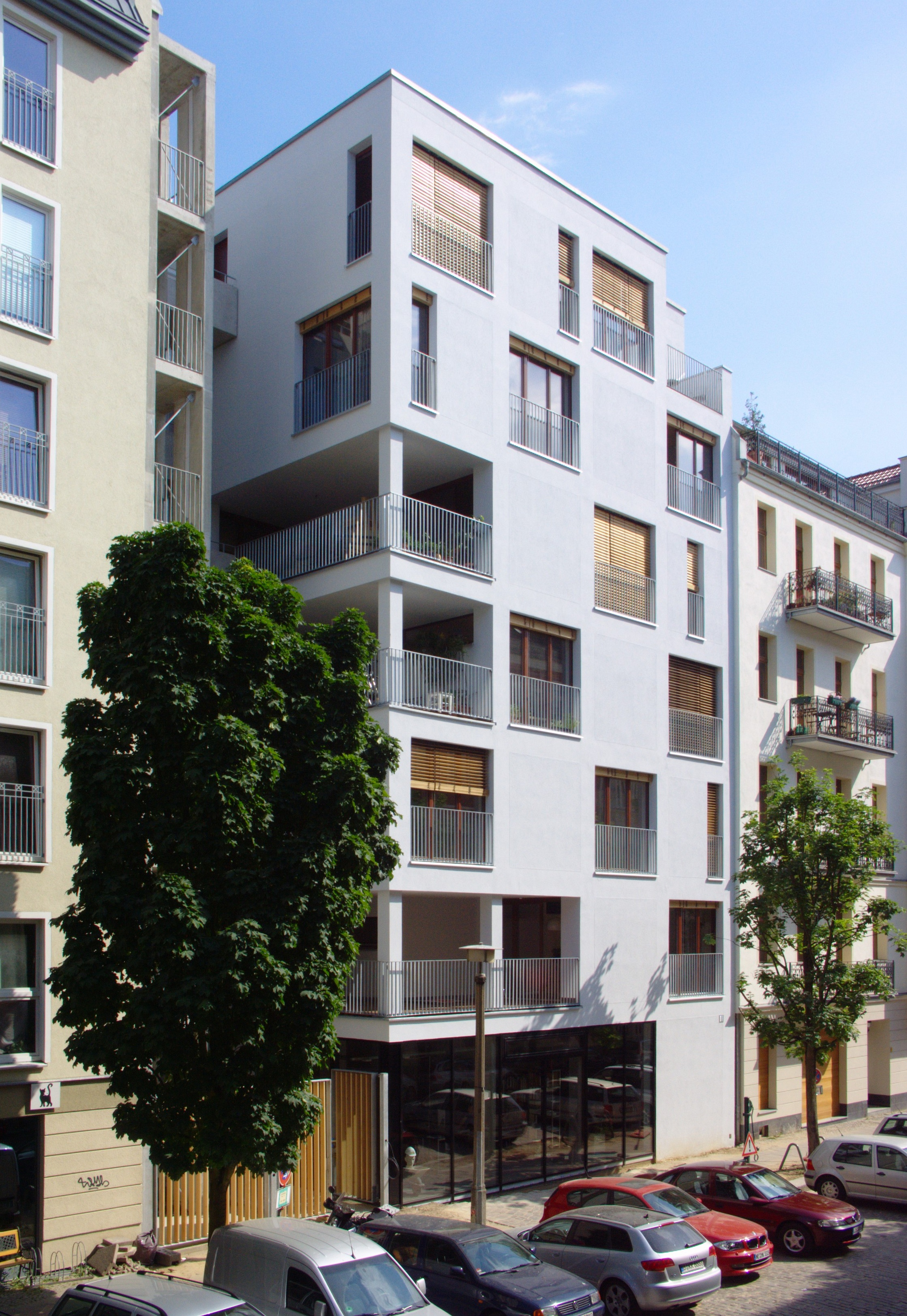 in Holzbauweise errichtetes Haus in der Berliner Esmarchstraße 3, fotografiert vom Balkon im ersten Obergeschoss eines Hauses der gegenüberliegenden Straßenseite